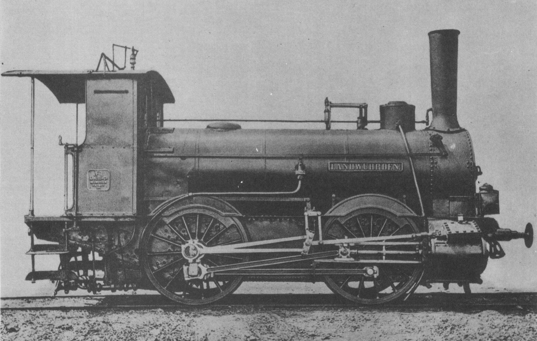 Dampflokomotive Oldenburgische G 1.